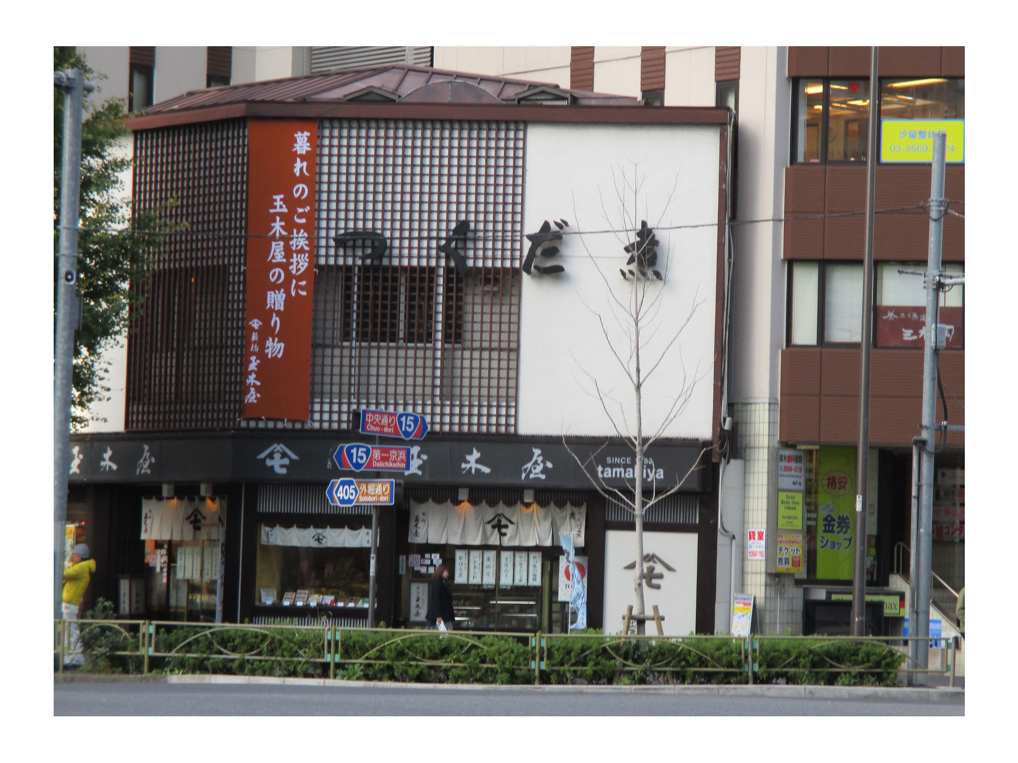 新橋玉木屋